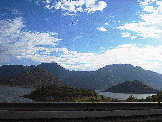 sierras michoacanas, infiernillo